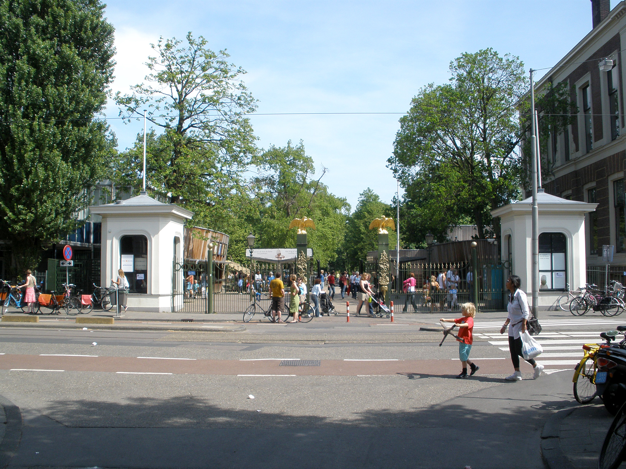 Entrance to Artis zoo on Plantage Kerklaan in Amsterdam